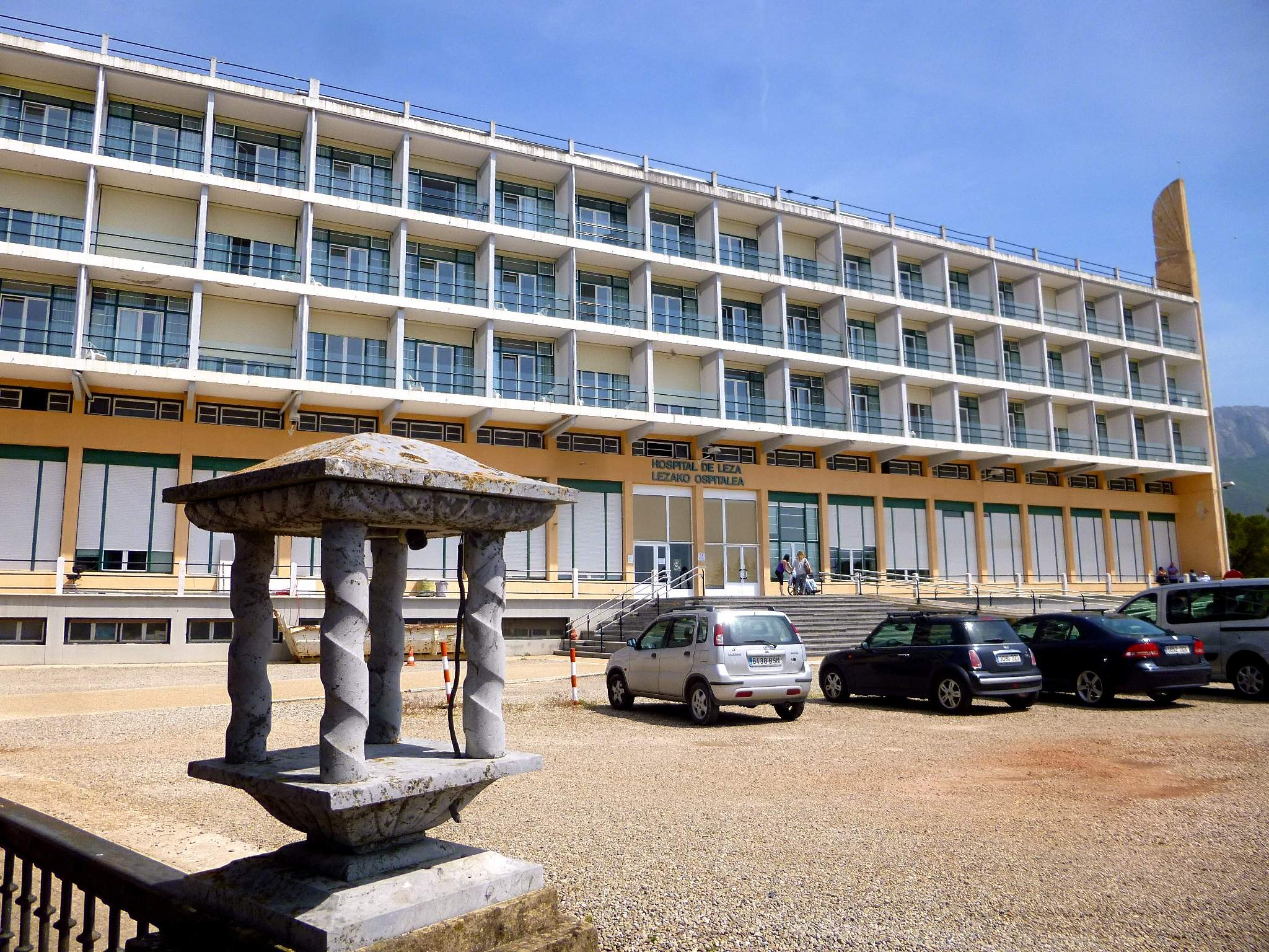 Hospital de Leza (Álava)